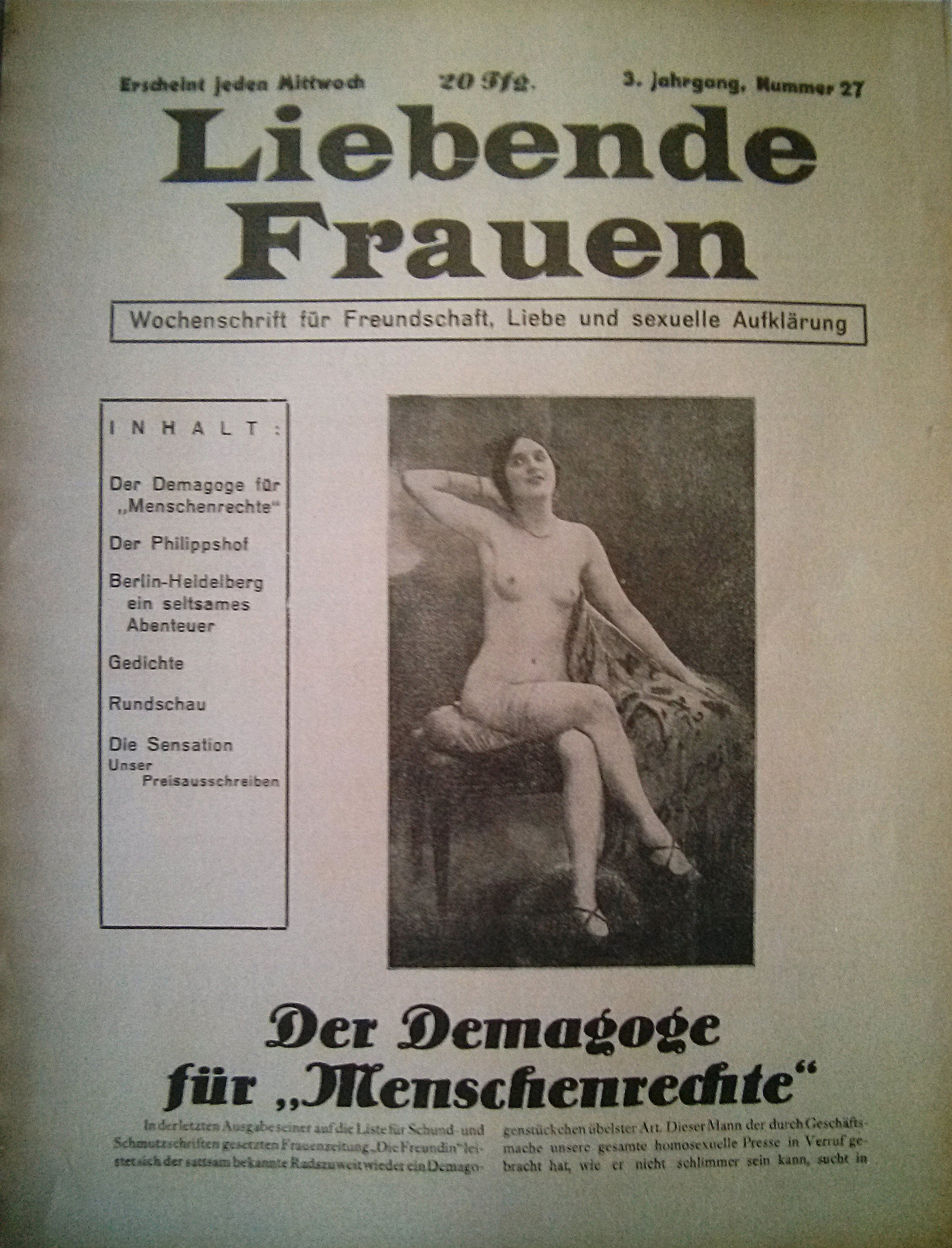 Aus der lesbischen Zeitschrift "Liebende Frauen", Berlin, 1928, Titelblatt Ausgabe 27